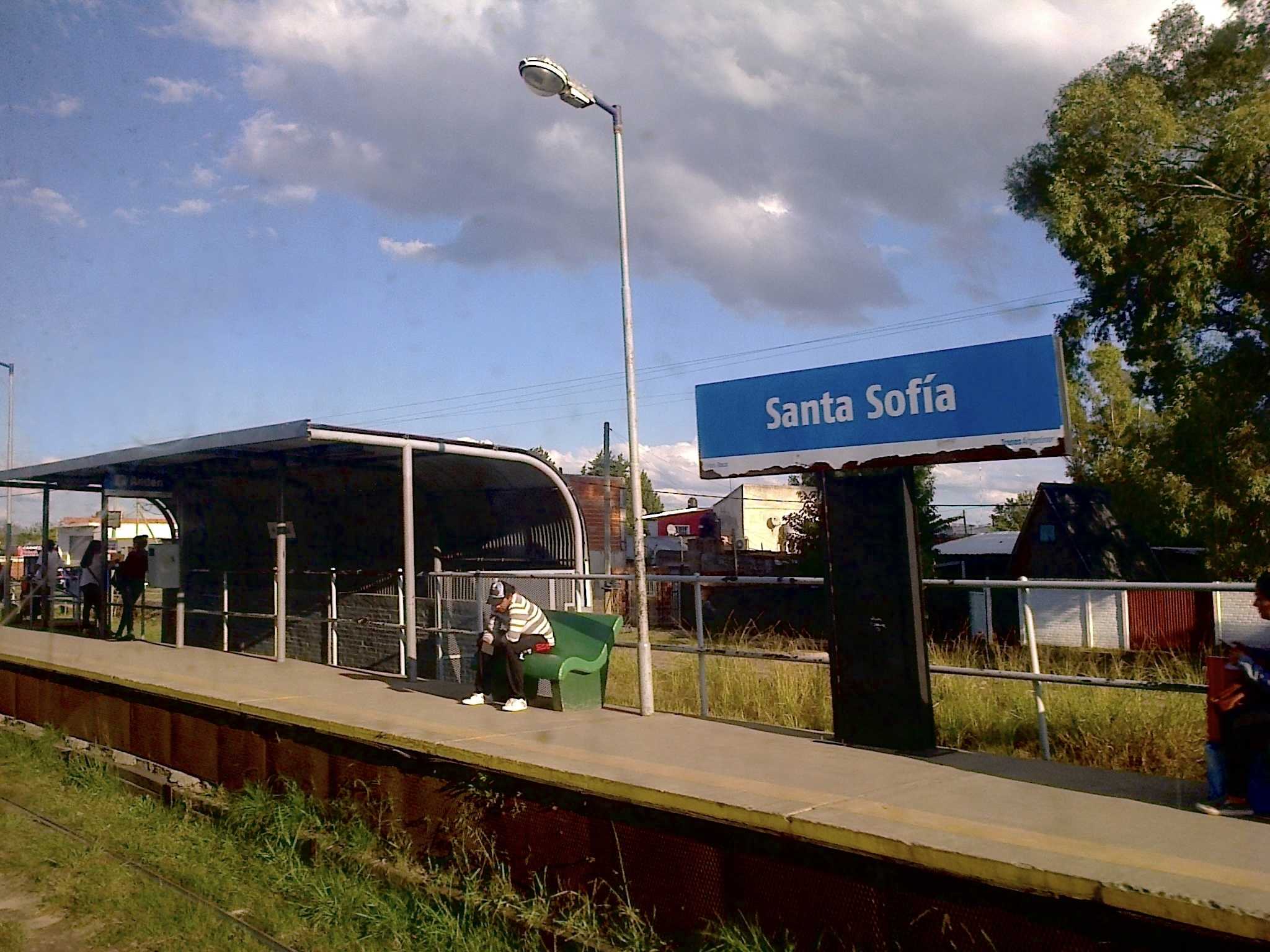 Foto de la Estacion